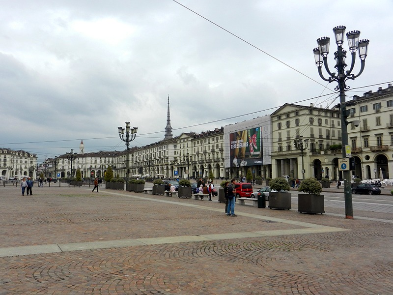 Torino - Piazza Vittorio Veneto